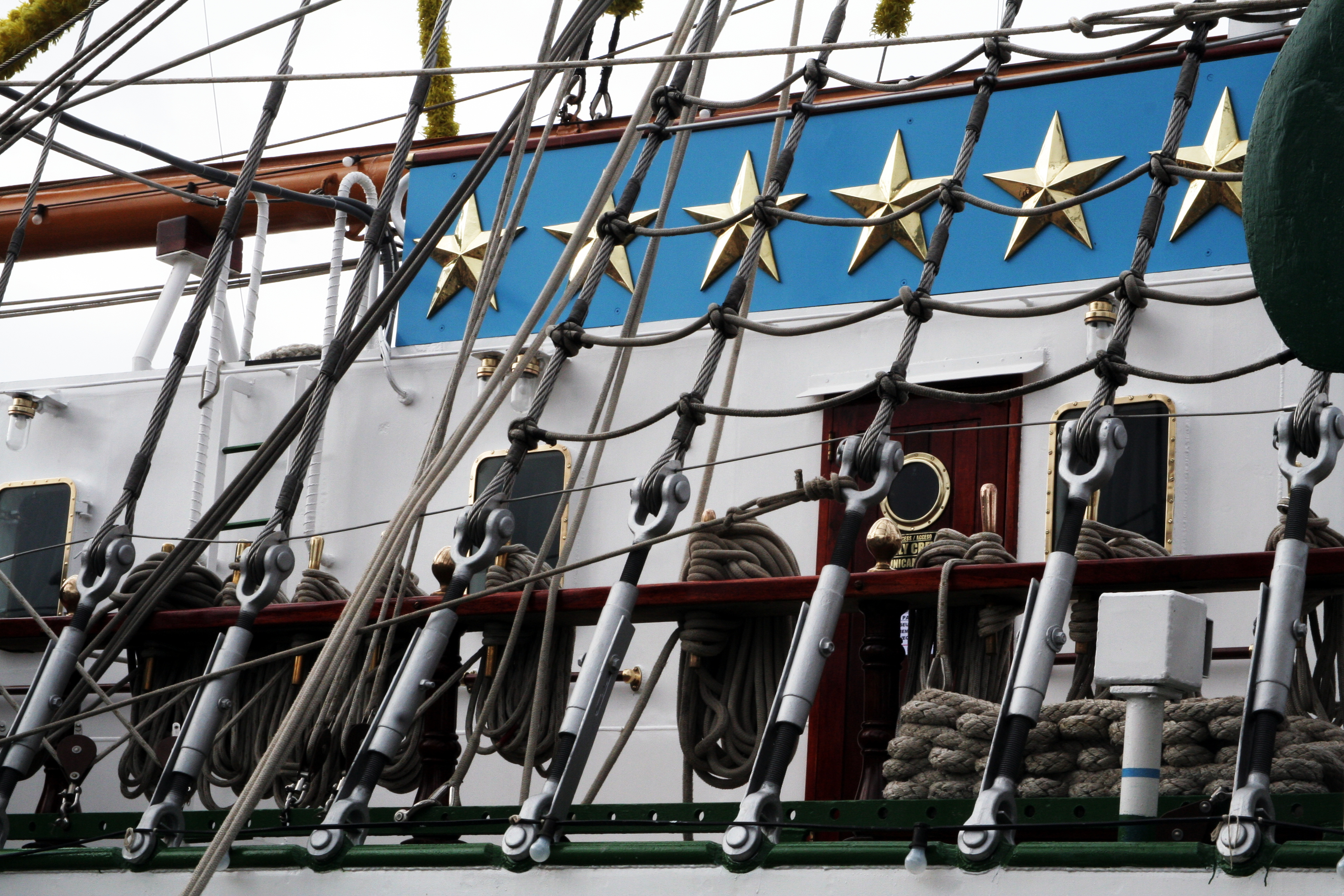 Armada de Rouen 2008